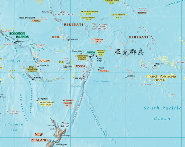 南太平洋與庫克群島相對位置圖 庫克群島是一個位於南太平洋上的半自治島嶼國家，與紐西蘭之間採自由結合的方式合作。本圖中可以見到庫克群島在南太平洋上的位置，而圖片西南角則可以看到紐西蘭的北島地區，以方便各位了解該群島與紐西蘭之間的相對位置。 本圖是採用自CIA World Fact Book上提供的地圖資料，根據需要由上傳者User:SElephant進行局部裁切與標示修改。根據美國政府的政策，由官方機構製作的文件與圖像皆屬公有領域的範圍，惟引用時仍需註明原出處。